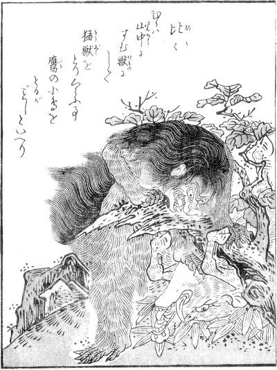 Hihi (比々, a baboon monster) from the Konjaku Gazu Zoku Hyakki (今昔画図続百鬼)